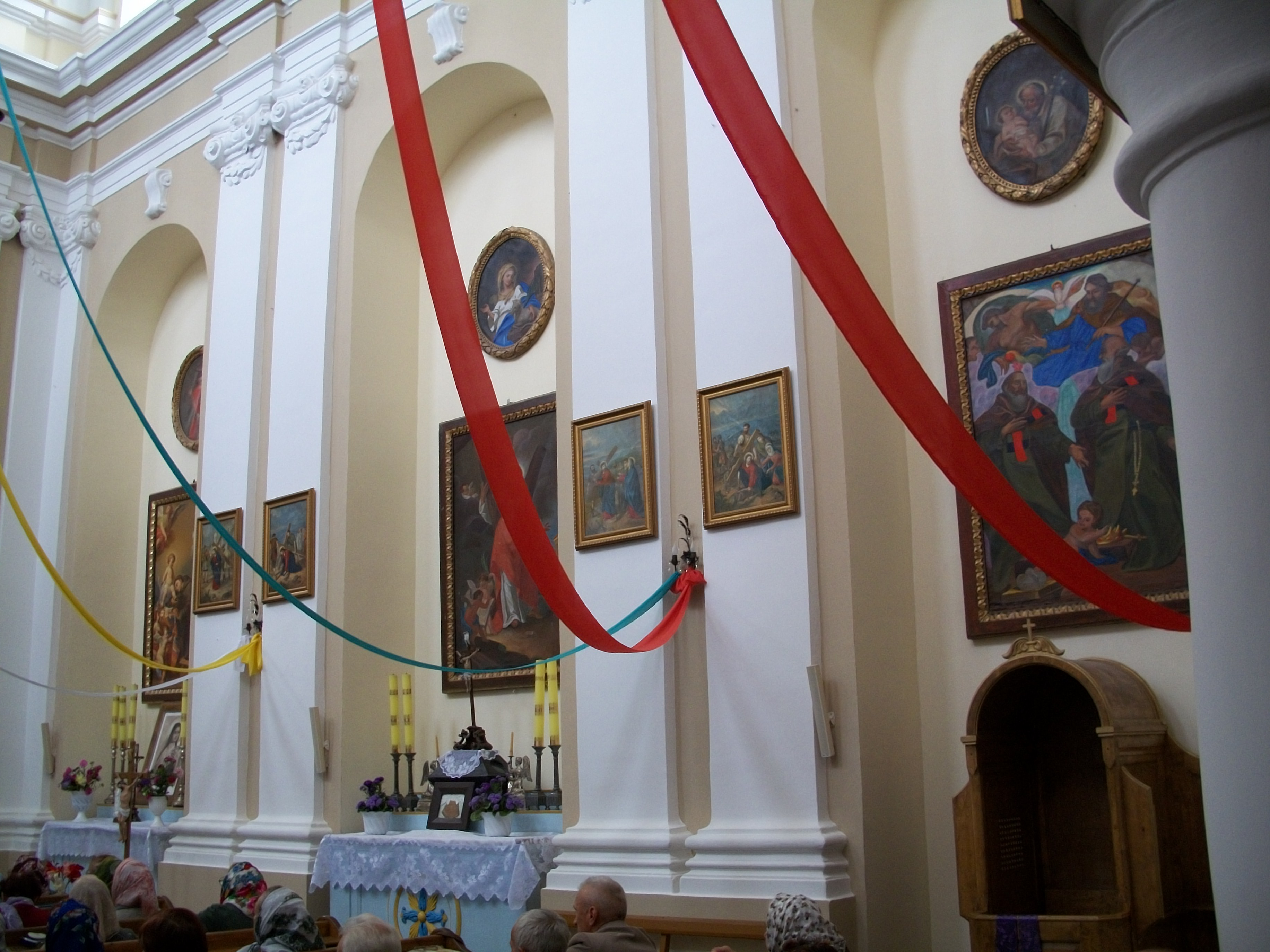 Беларуская (тарашкевіца): Комплекс былога кляштара трынітарыяў: касьцёл Сьв. апостала Андрэя кляштарны корпус. г.п. Крывічы This is a photo of Belarusian heritage monument. Reference number: 612Г000436 ( WLM)